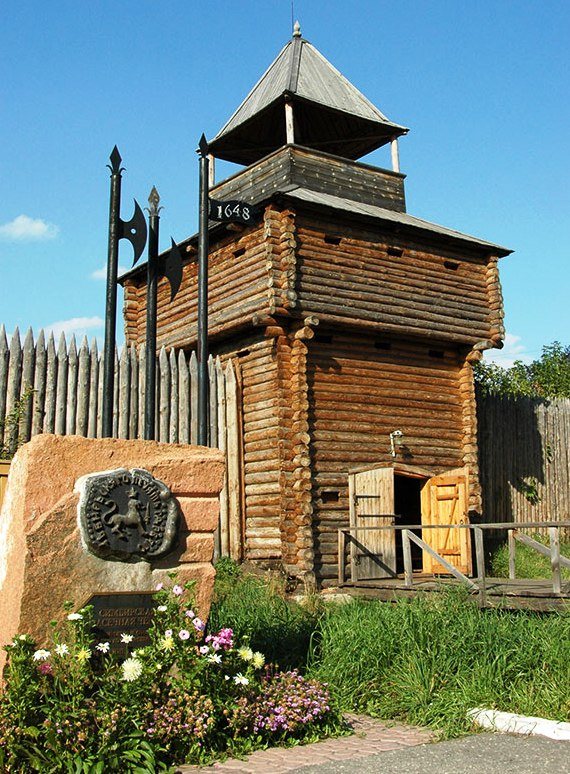 Фото входа в музей Симбирская Засечная черта.